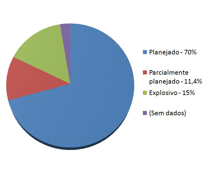 Estupro planejado